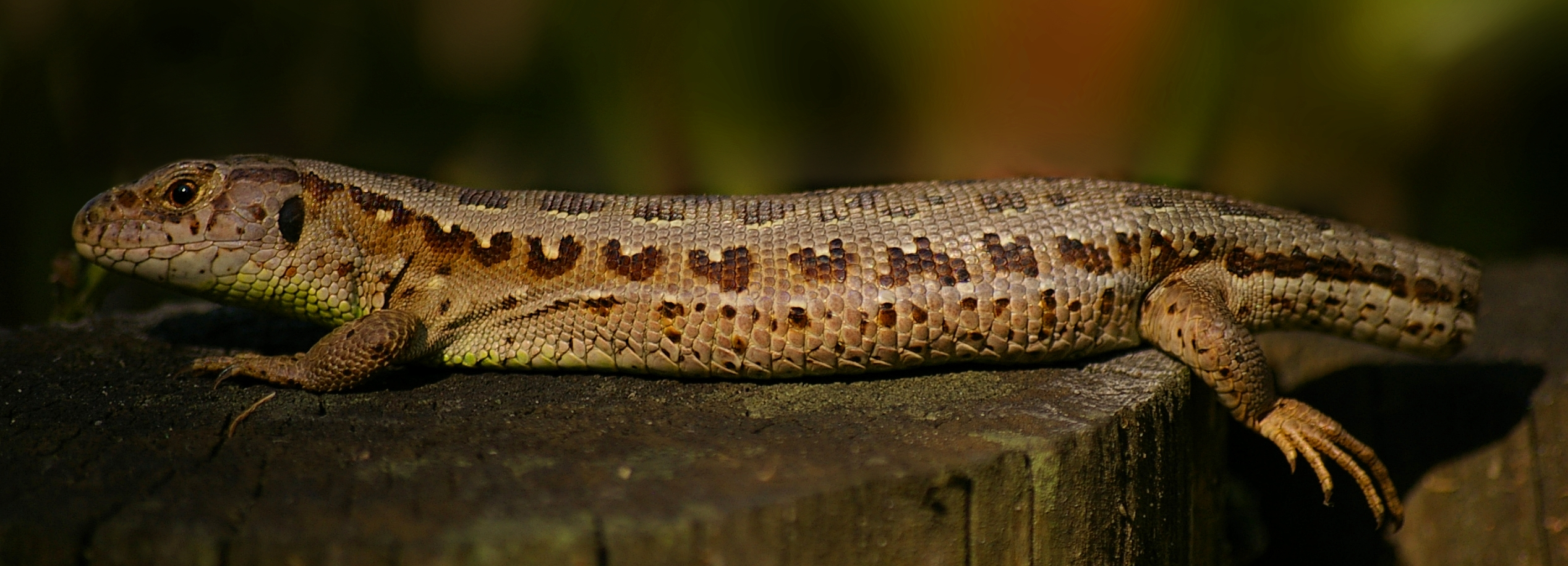 Zwinka. Lacerta agilis.